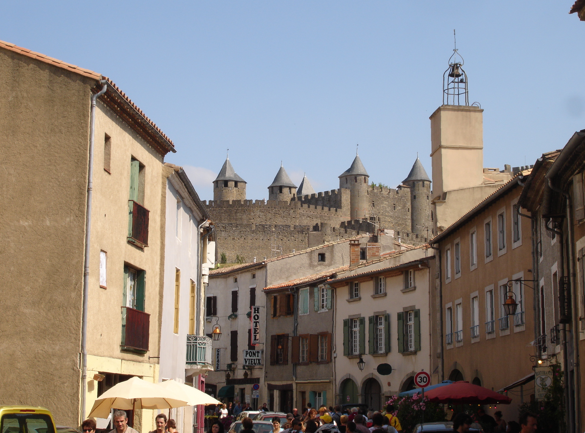 France, Aude, Carcassonne, rue Trivalle.